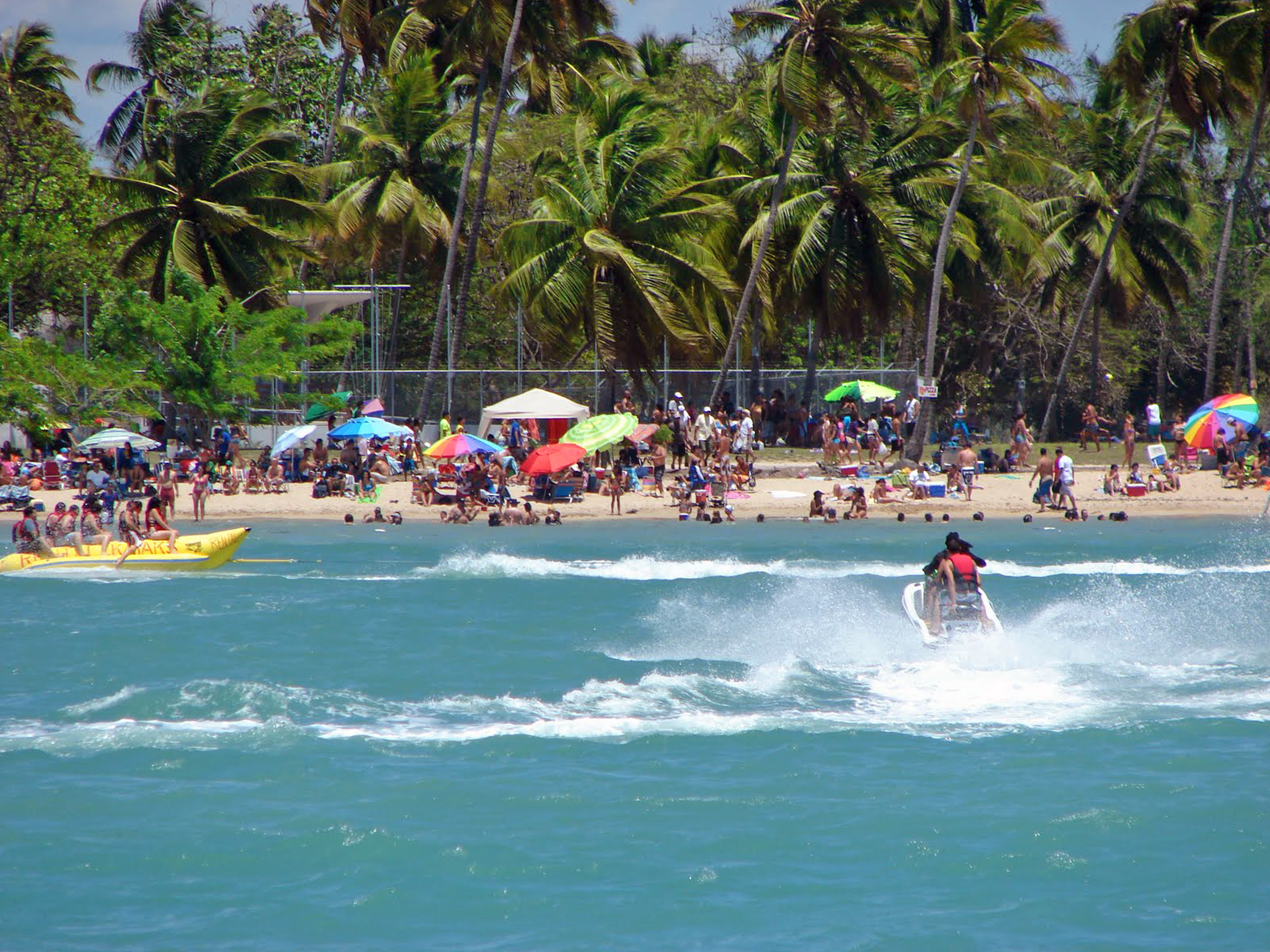 Bañistas en la Playa de Boquerón.